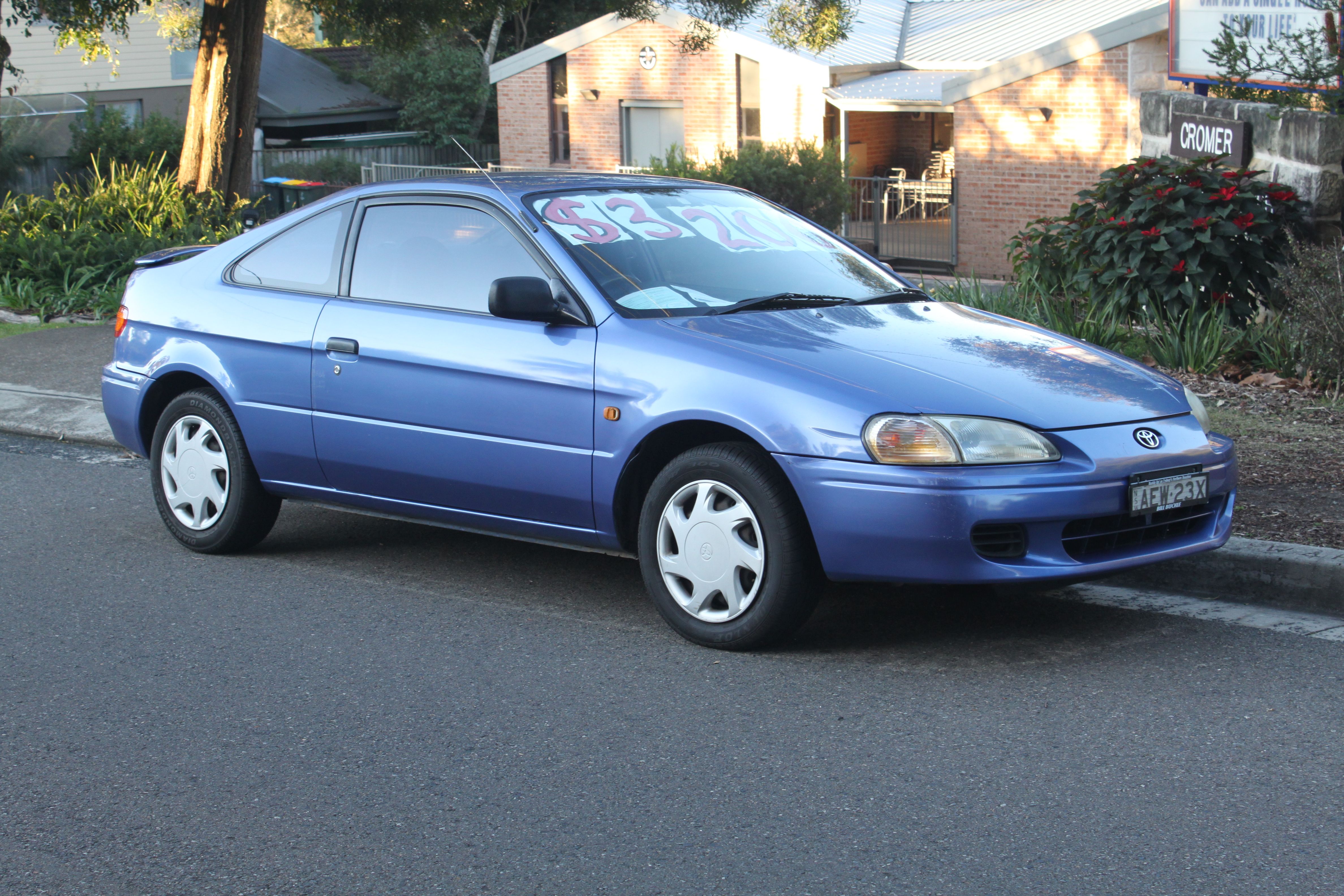 Toyota Paseo EL54R